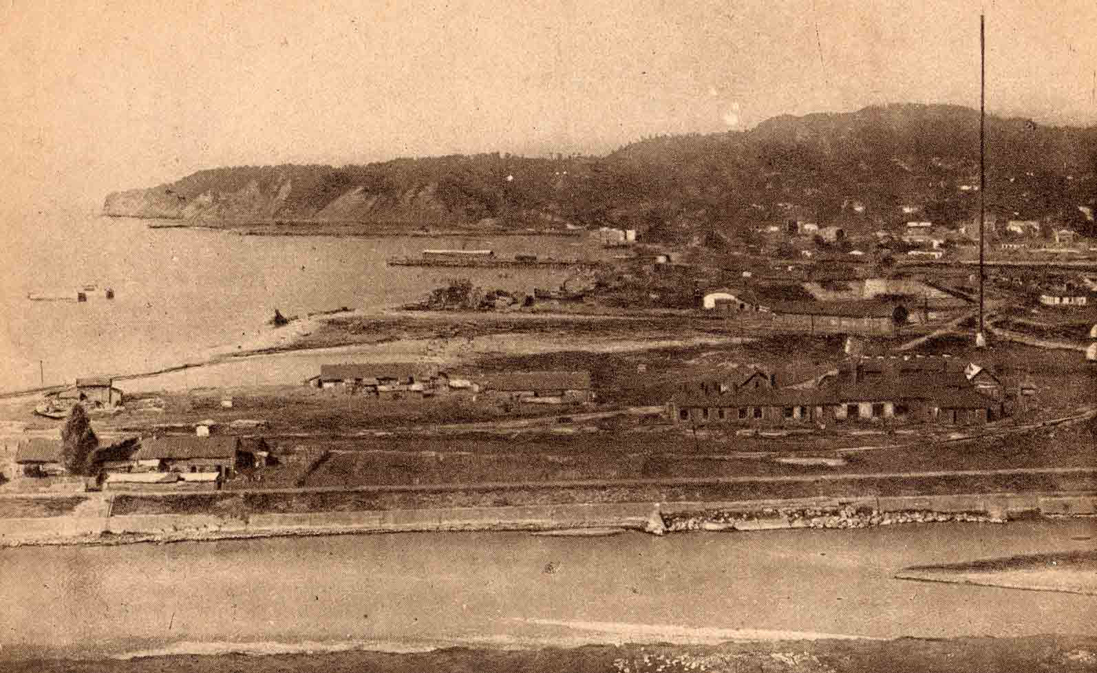 Фотография Туапсе на рубеже XVIII-XIX веков